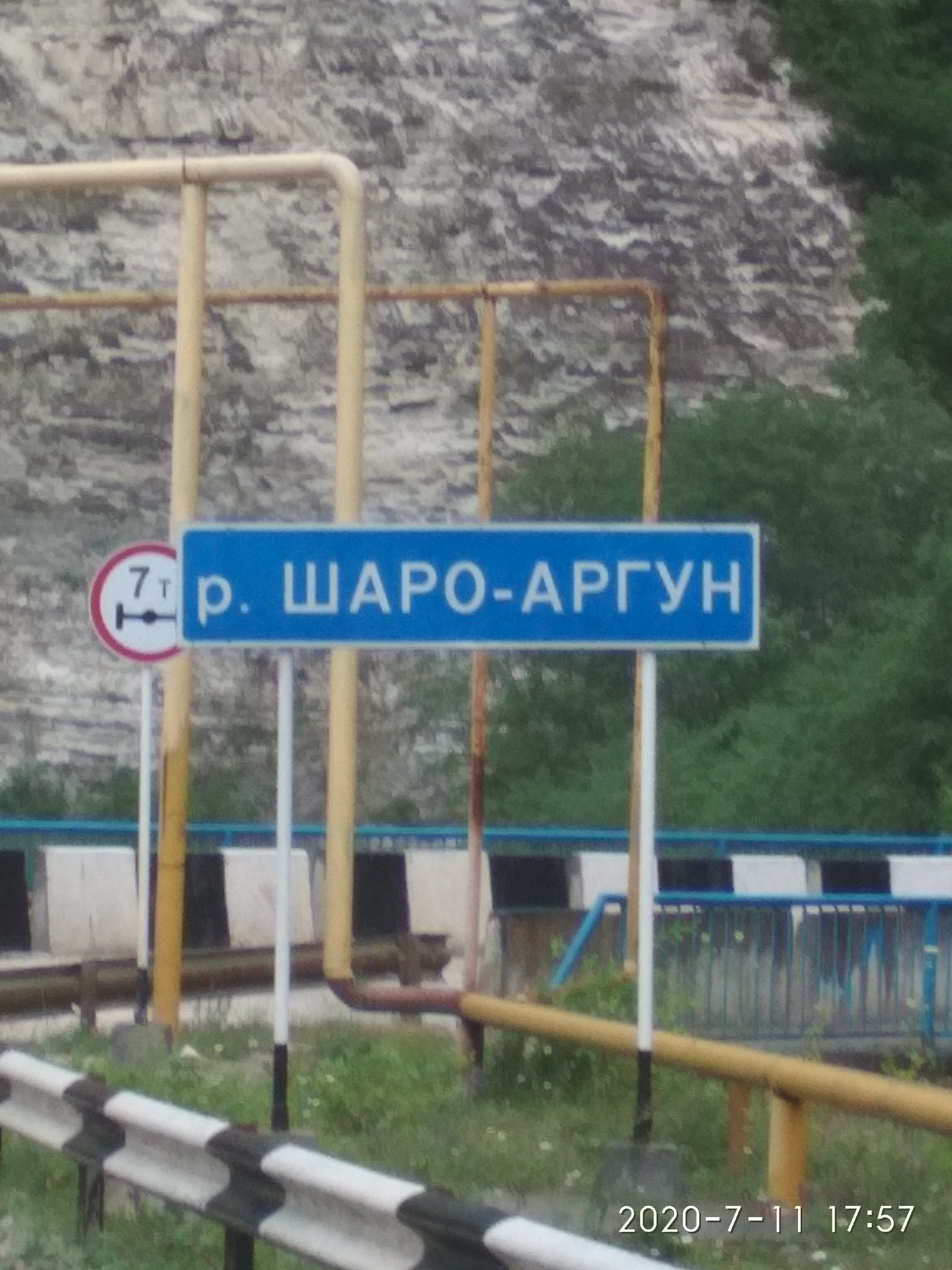 Нохчийн: Шаройн Орган тӀехулара тӀай